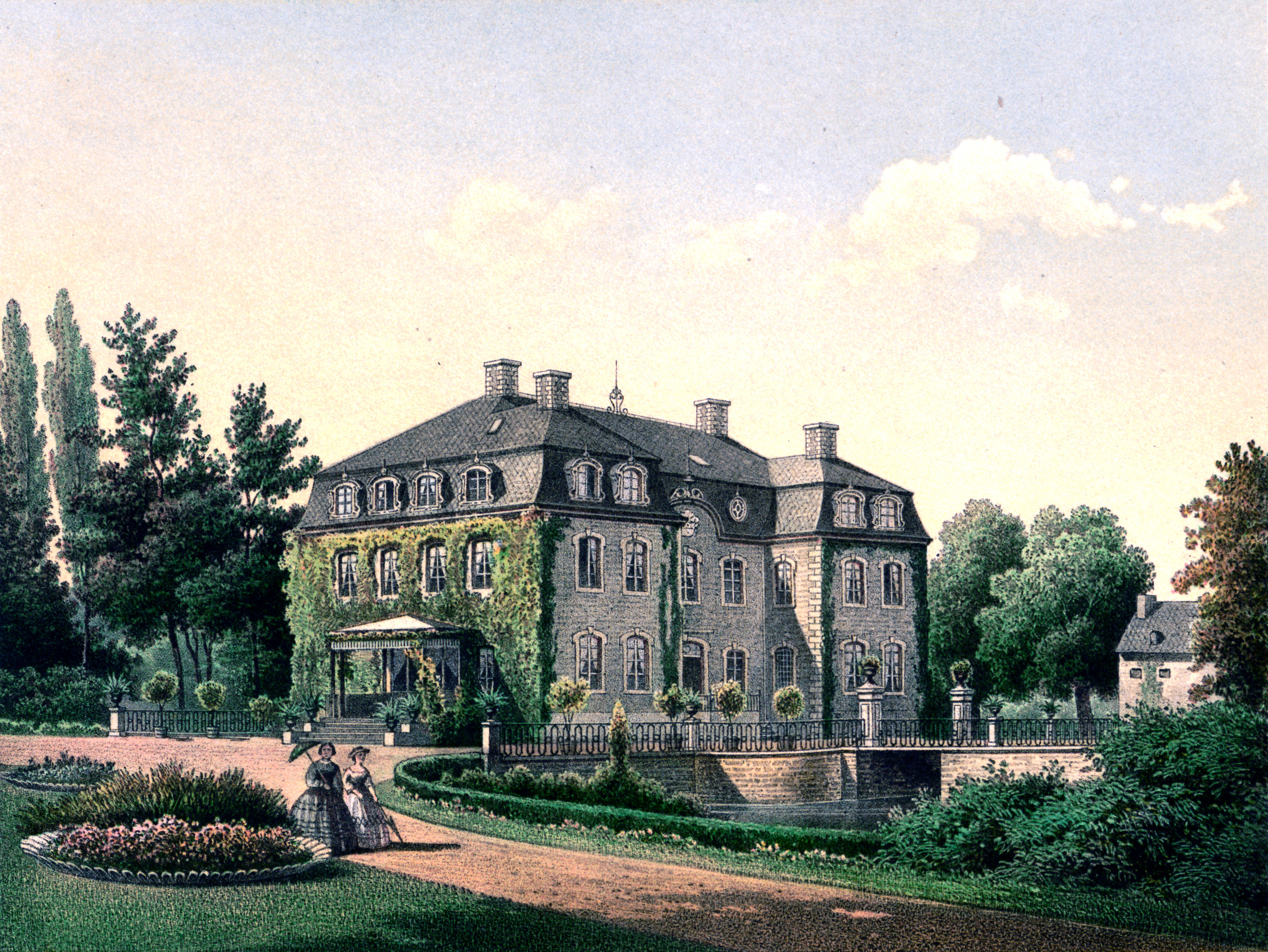 Schloss Lontzen, Lithografie aus dem 19. Jahrhundert